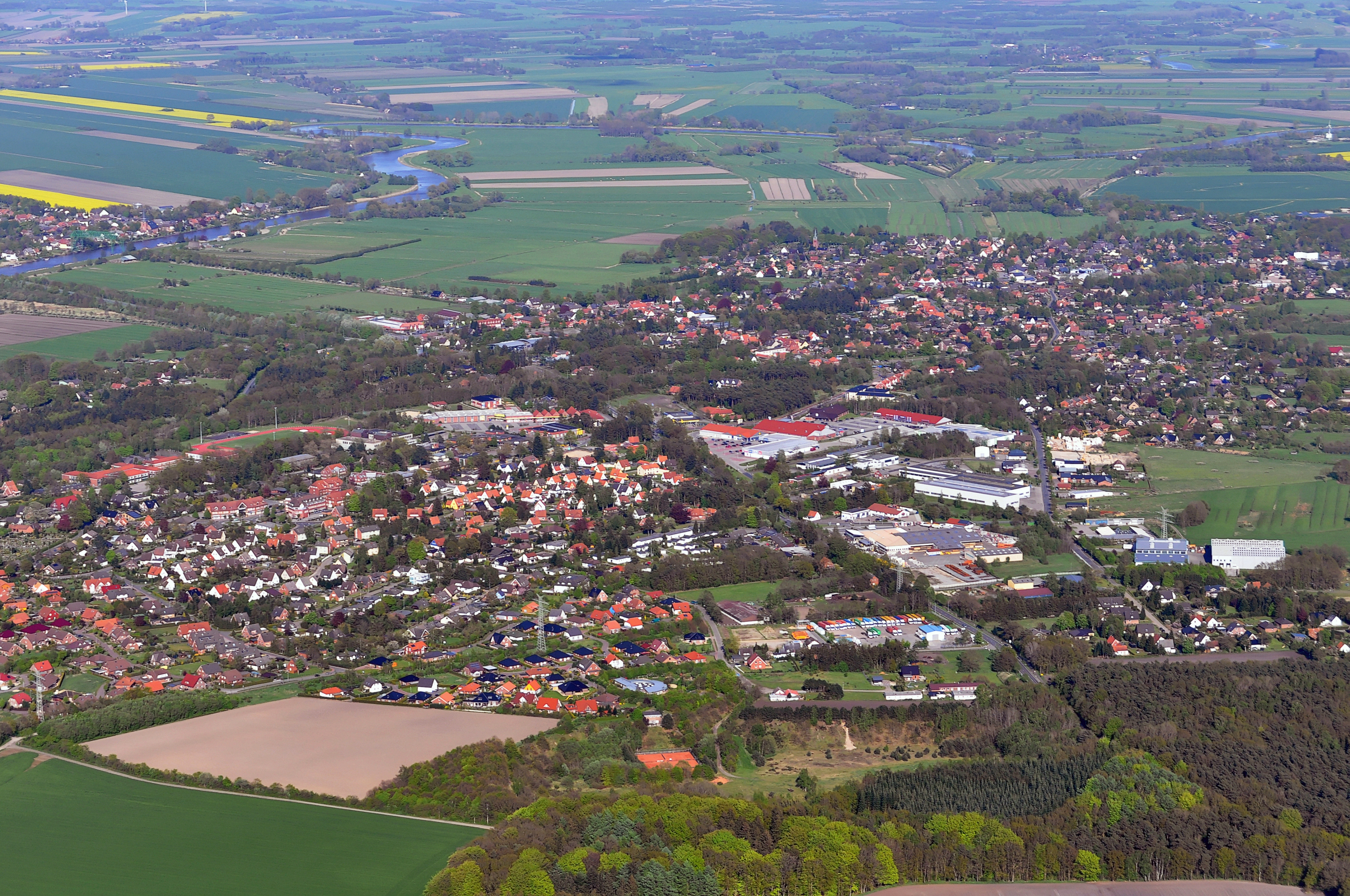 Luftbilder von der Nordseeküste 2012-05